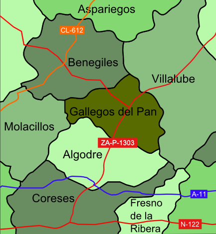 Mapa con los municipios limítrofes y los accesos a Gallegos del Pan (Zamora, España/Spain)